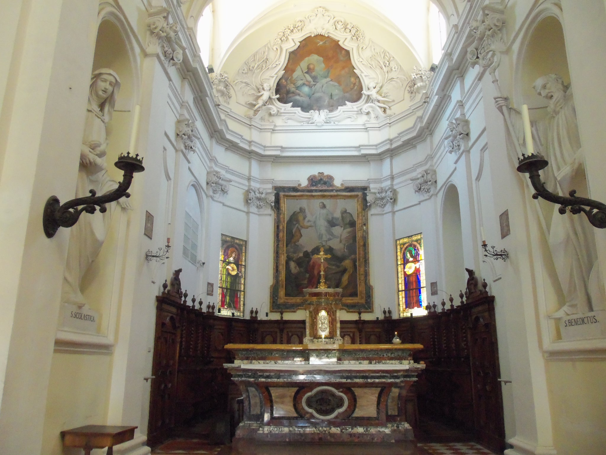 Interno della Chiesa, sul fondo la tela della Trasfigurazone ad opera del Lazzarini e due delle quattro statue presenti